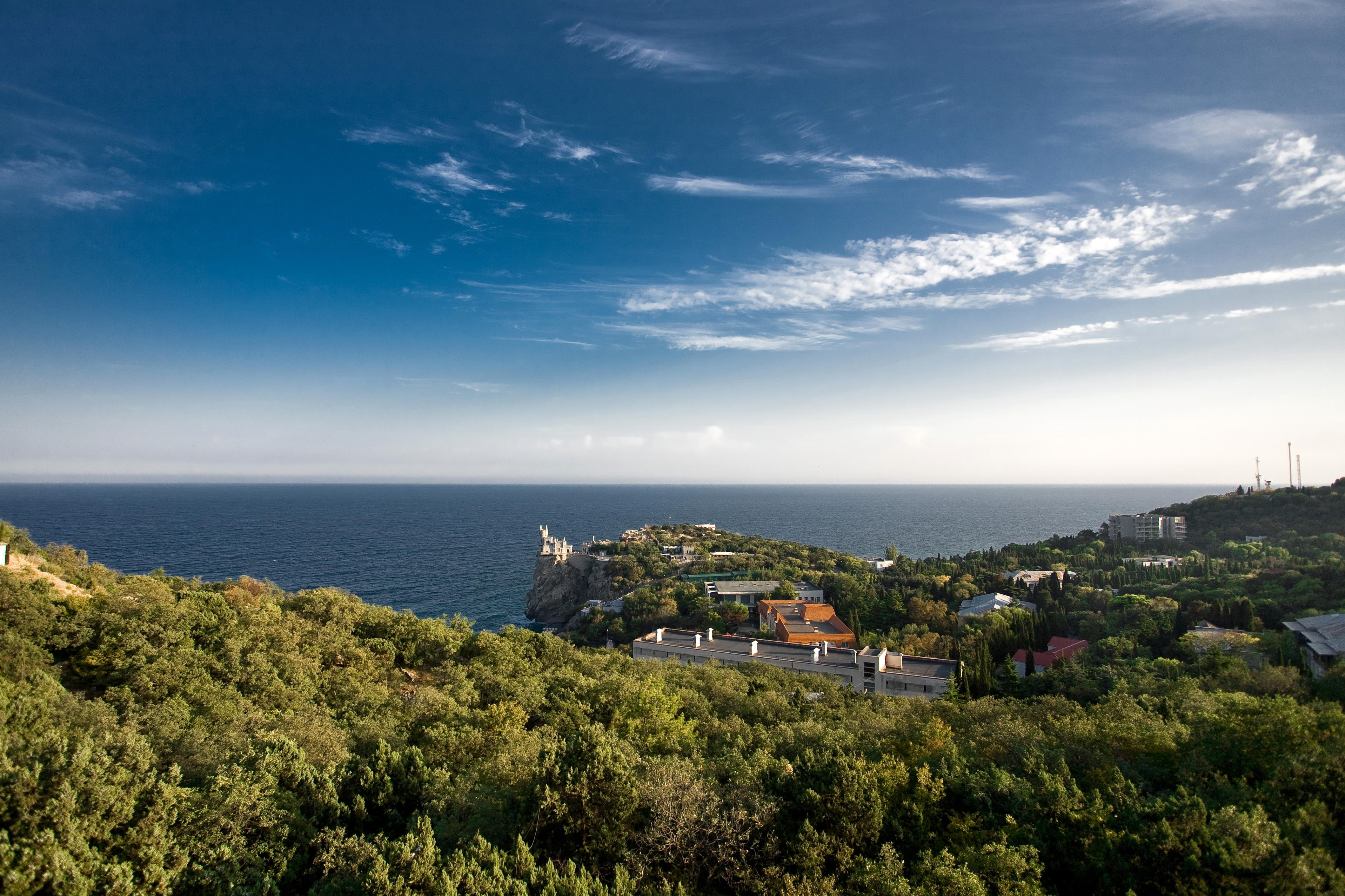 Гаспра вул. Алупкінське шосе, 9